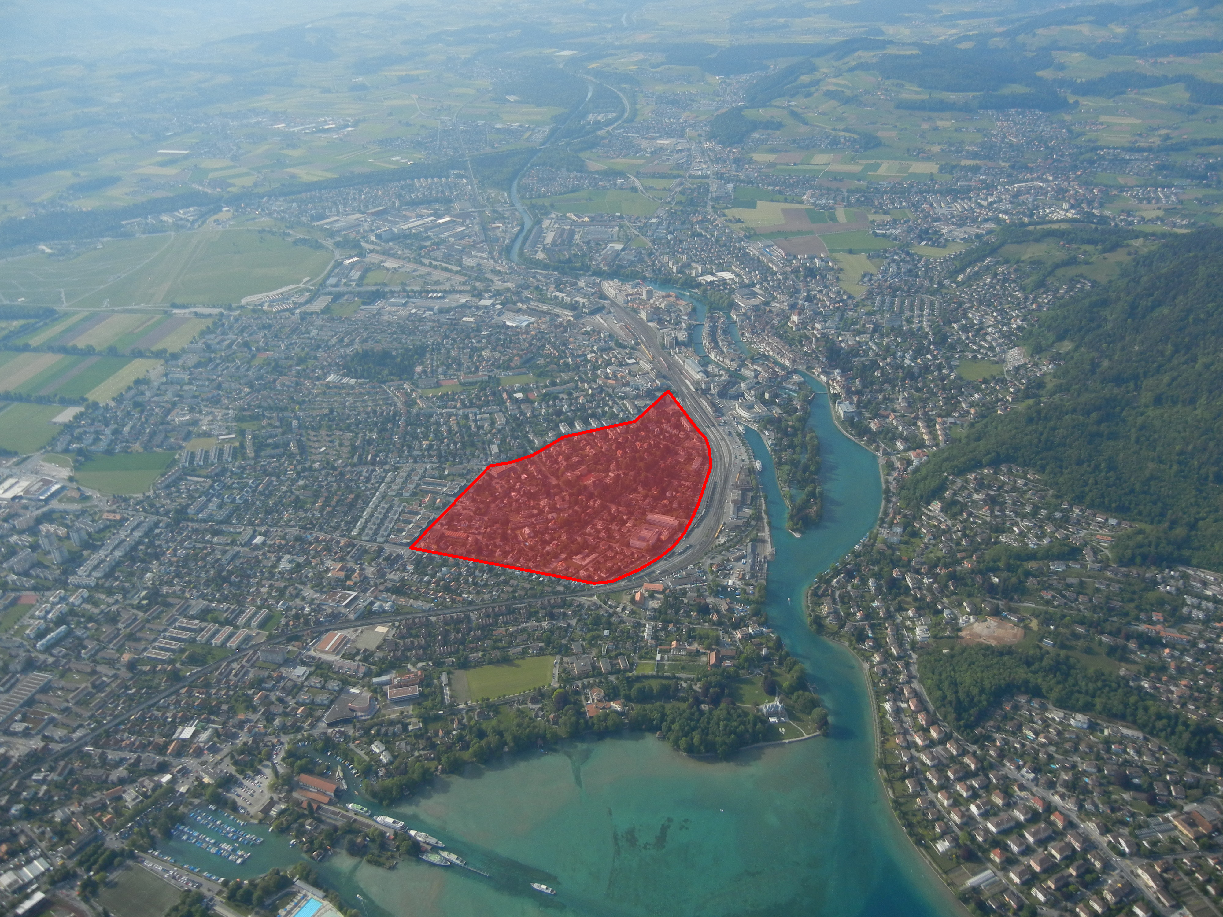 Luftaufnahme von Thun mit dem Seefeld-Quartier, Foto: Thuner at de.wikipedia (Eigenes Werk) [Public domain], via Wikimedia Commons